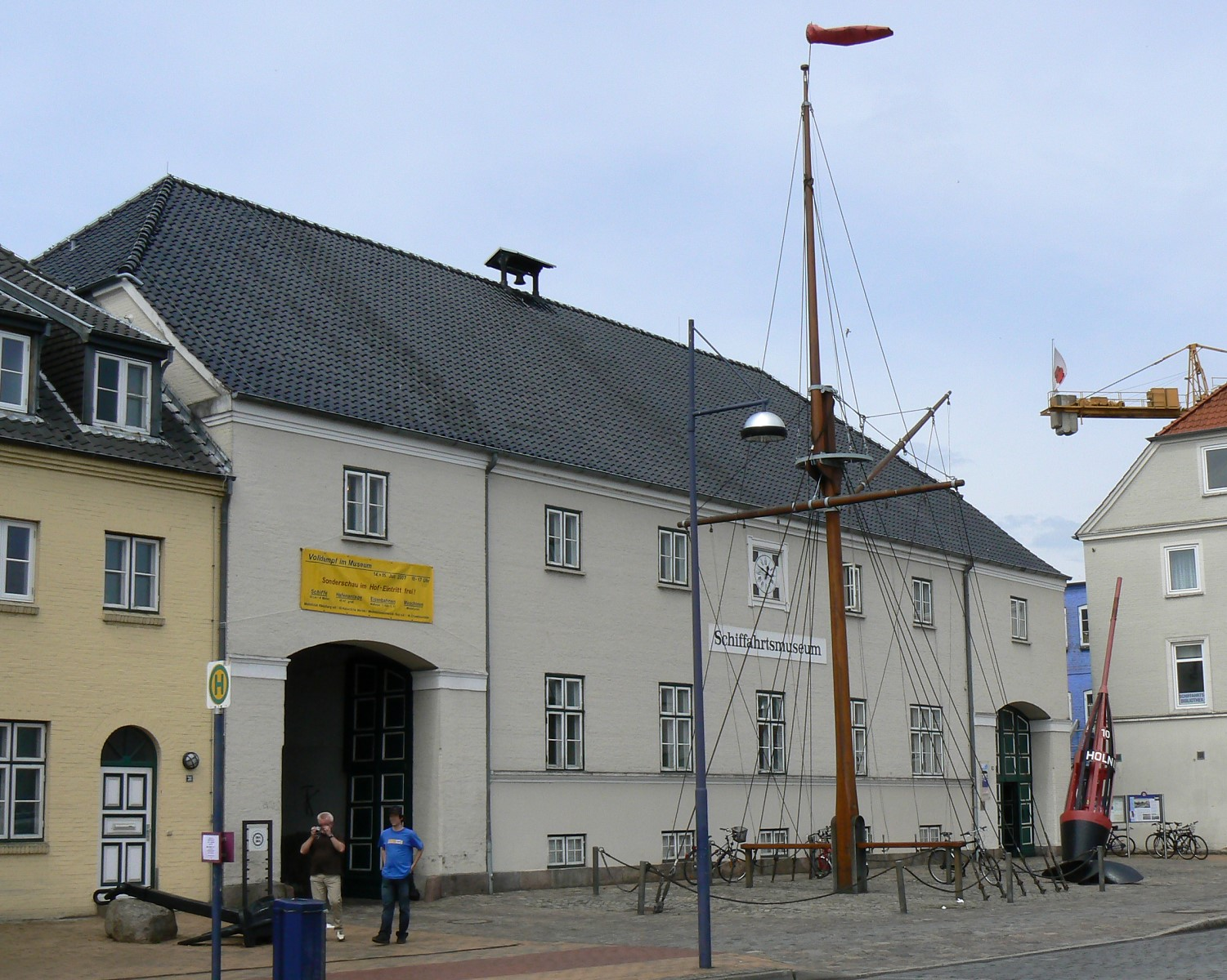 Flensbuger Schifffahrtsmuseum.